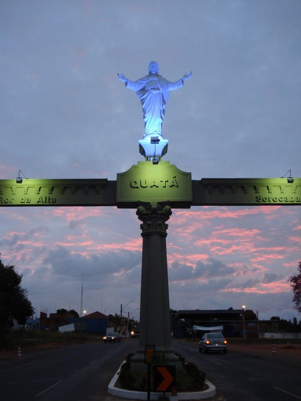 Entrada de Quatá-SP